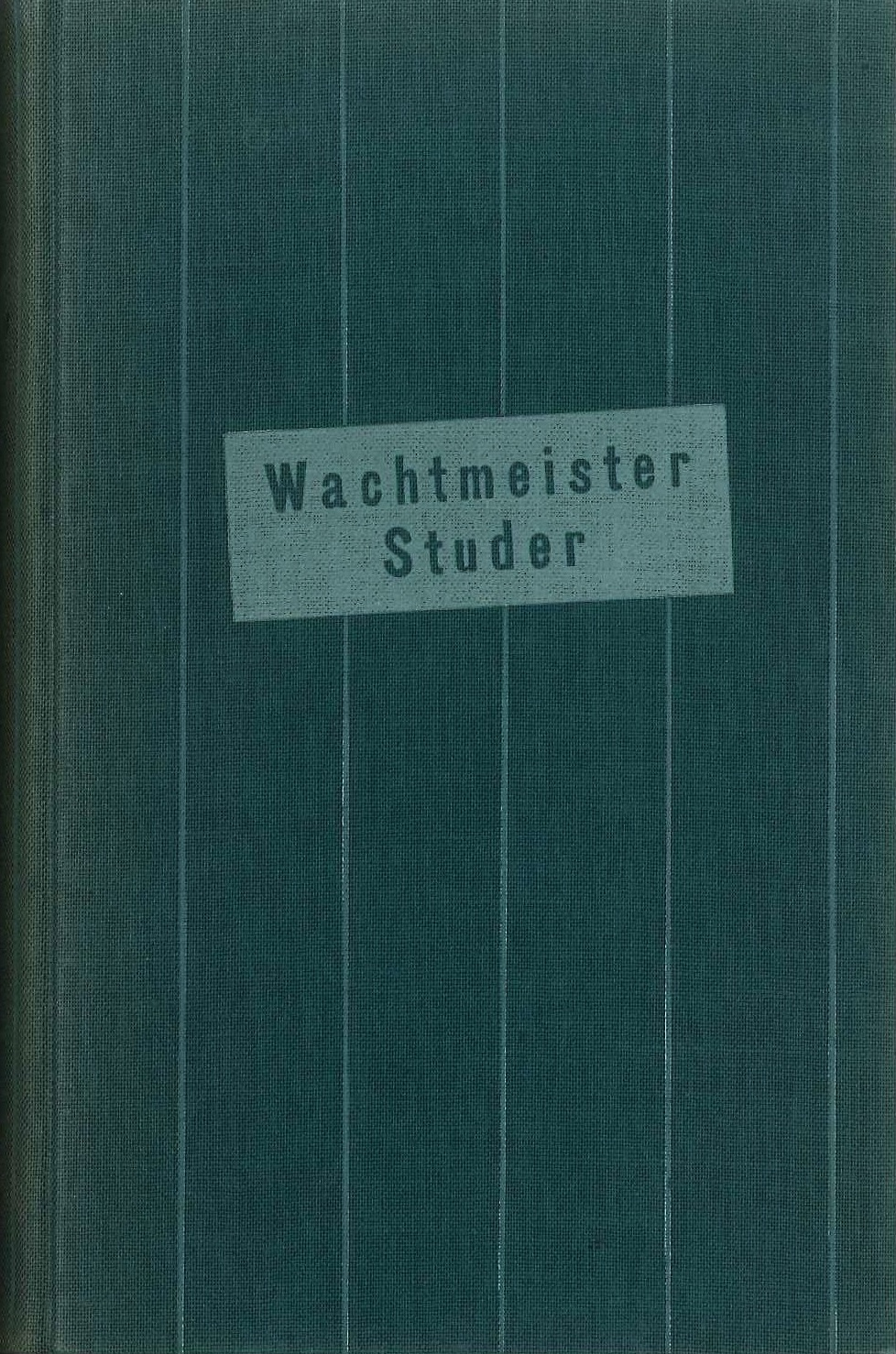 Buchcover Leinen von "Wachtmeister Studer", 2. Auflage, Morgarten-Verlag Zürich, 1939